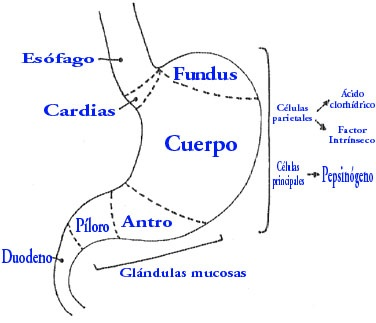 Modificación del error que había en la anterior imagen del estómago